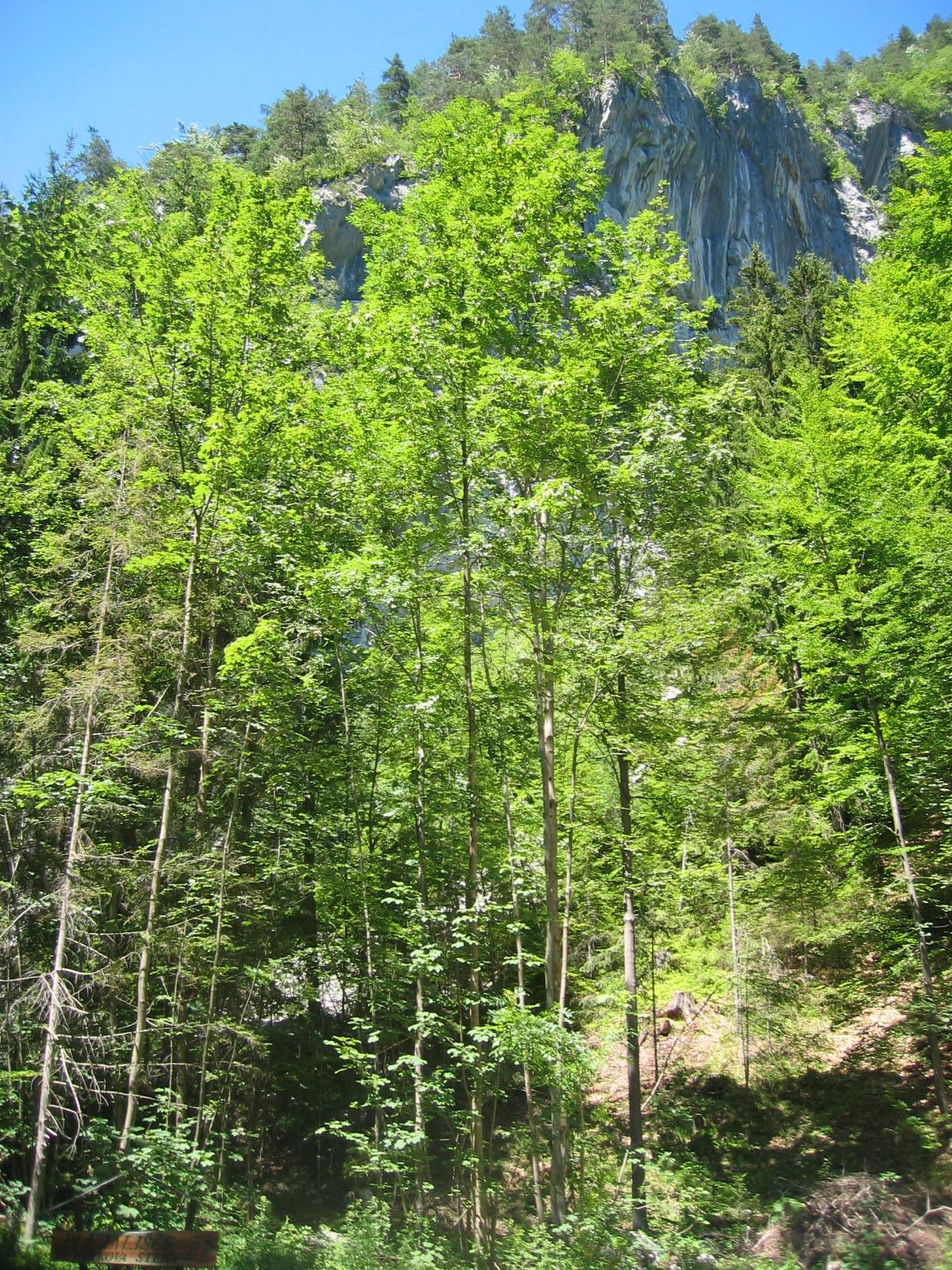 Burjakova Stena, climbing resort at Koroška, Slovenija